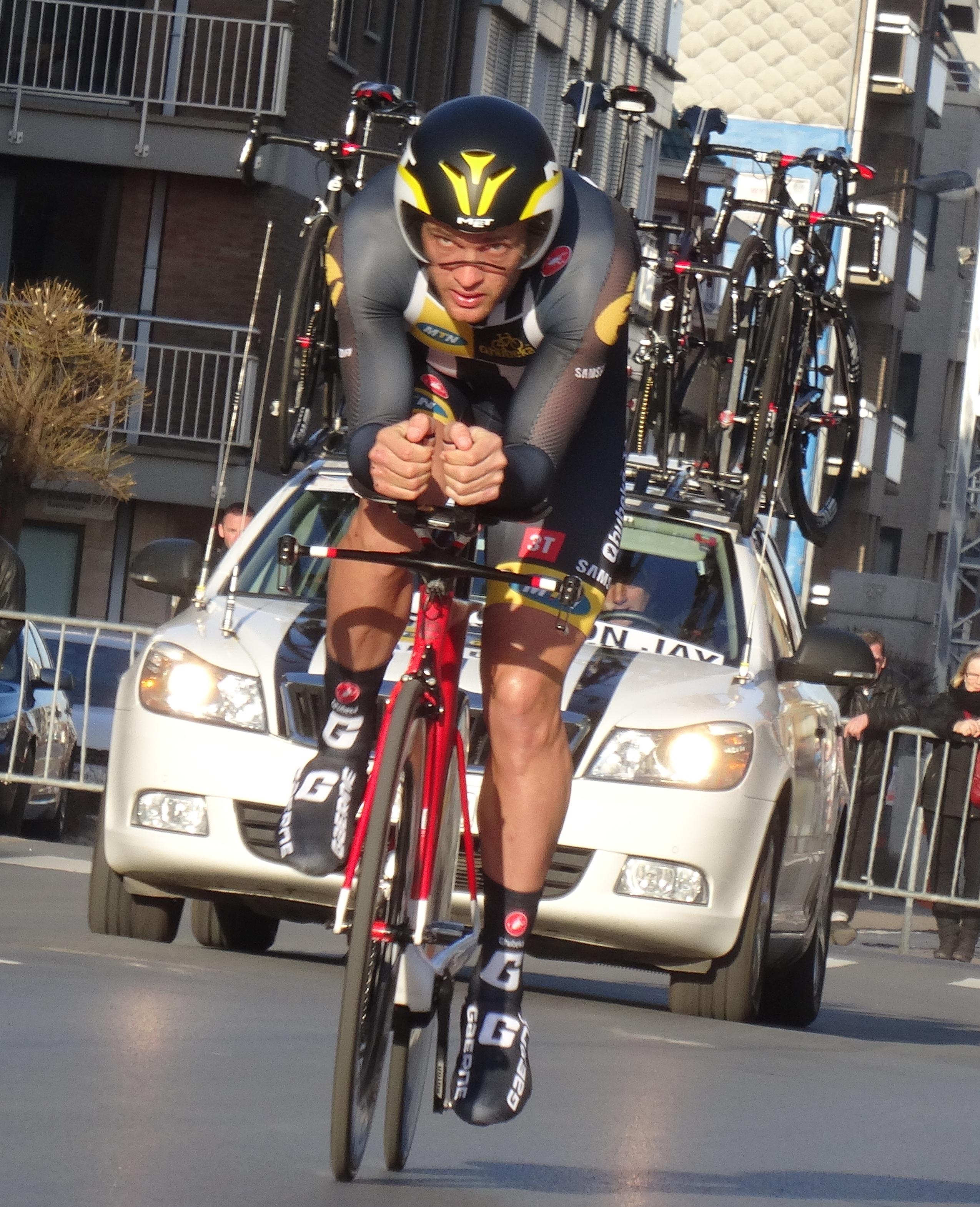 Reportage réalisé le vendredi 6 mars à l'occasion du contre-la-montre individuel du prologue des Trois jours de Flandre-Occidentale 2015 à Middelkerke, Belgique.